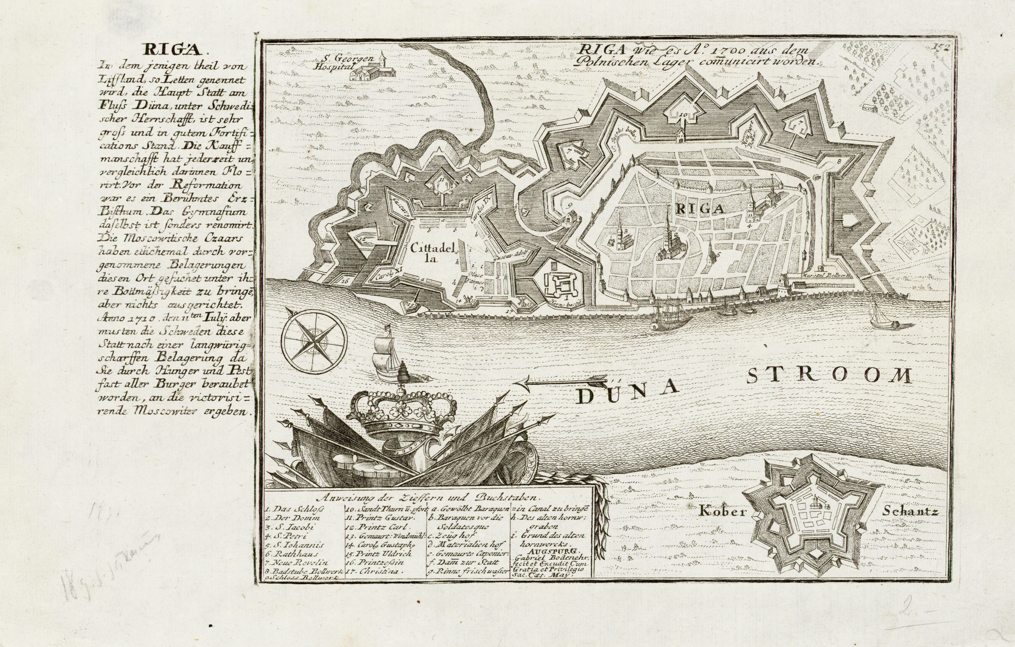 Riga wie es A 1700 aus dem Polnischen Lager communicirt worden